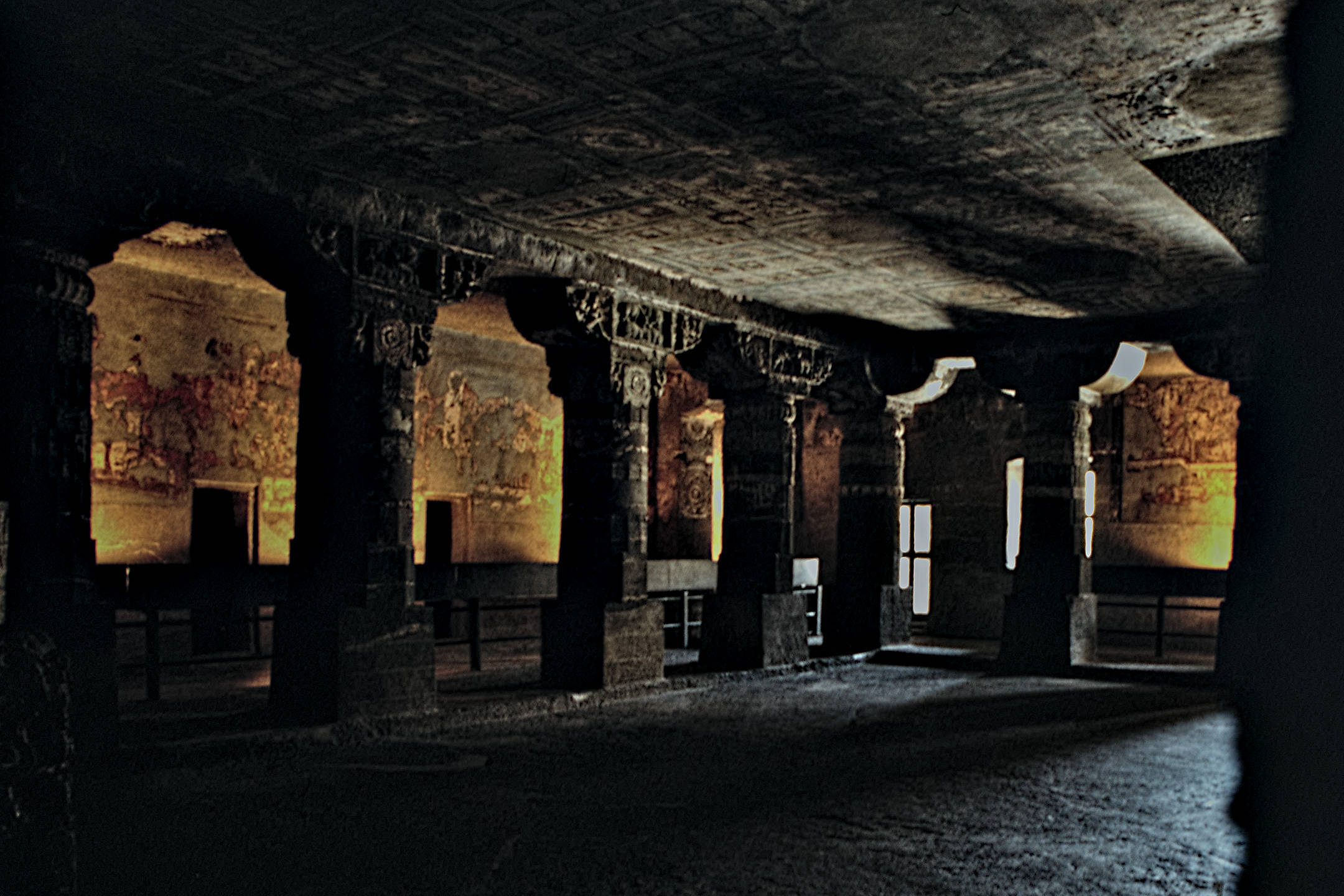 Ajanta Höhle Detail 1